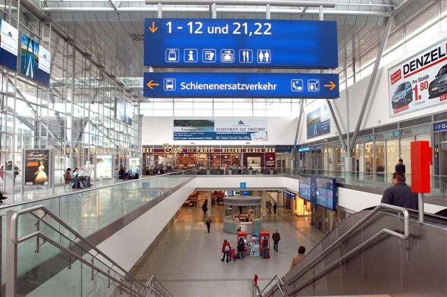 central station, Linz